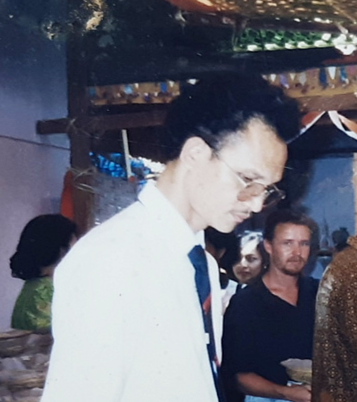 Pdt. Em. Dr. I Nengah Ripa, M.Th